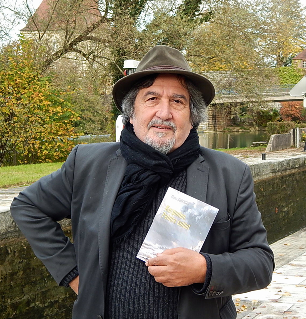 photo Mario Morisi avec son dernier roman